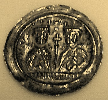 Silber Frederick I und Beatrix